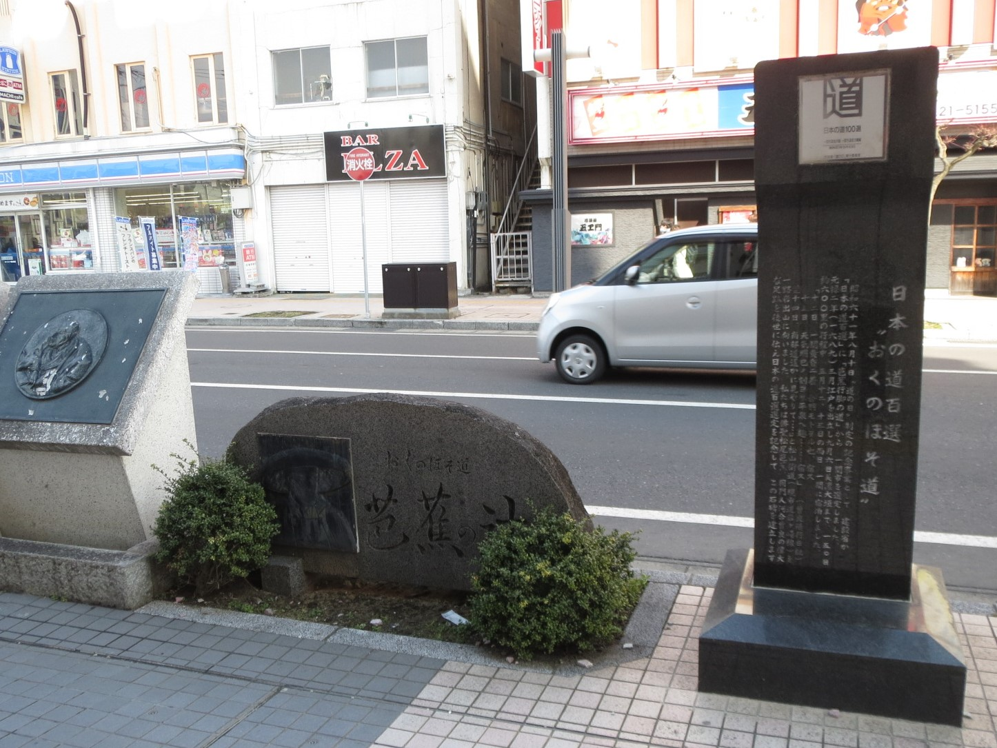 一関市にある道百選モニュメント Canon IXY 3